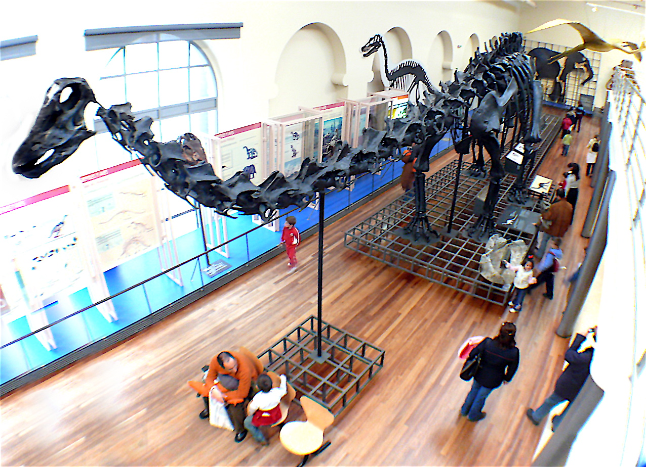 Vista general de la sala de Historia Natural del Museo Nacional de Ciencias Naturales de Madrid en la que destaca la réplica del esqueleto de Diplodocus canegiei, obsequio de Mr. Carnegei a partir de un ejemplar hallado en Pittsburgh